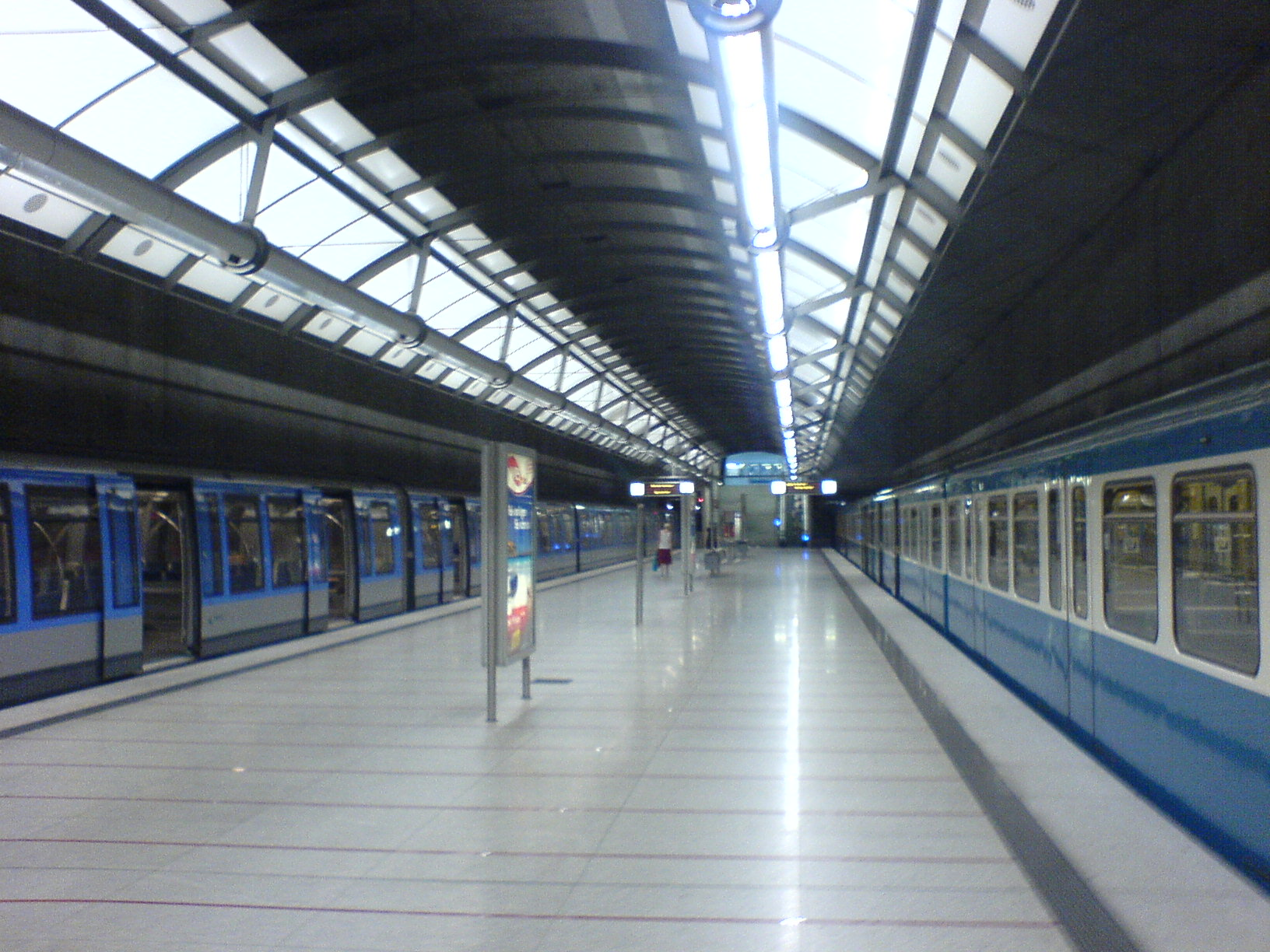 U-Bahn-Haltepunkt Messestadt-Ost (München), Bahnsteig.